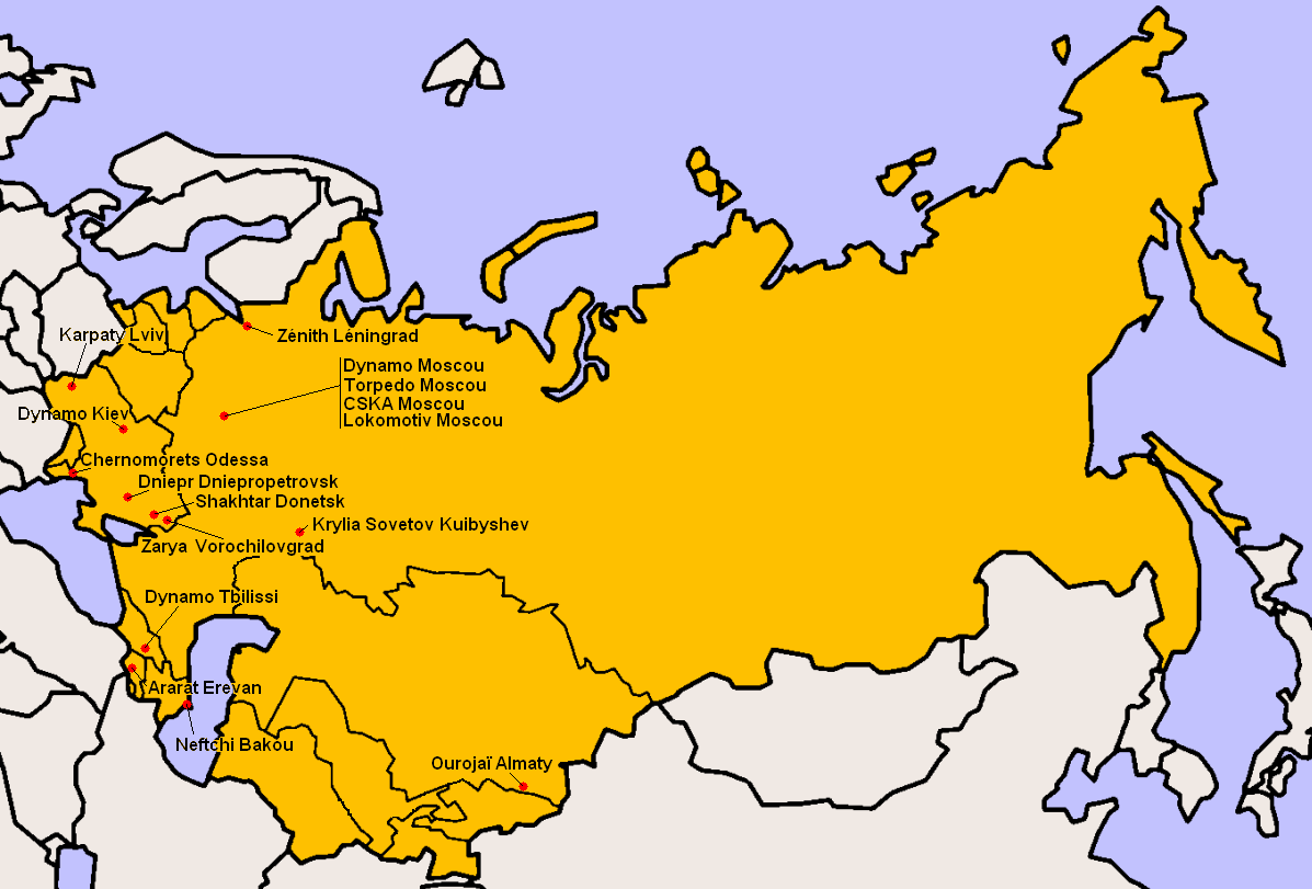 Clubs participants à la Division Supérieure 1977.